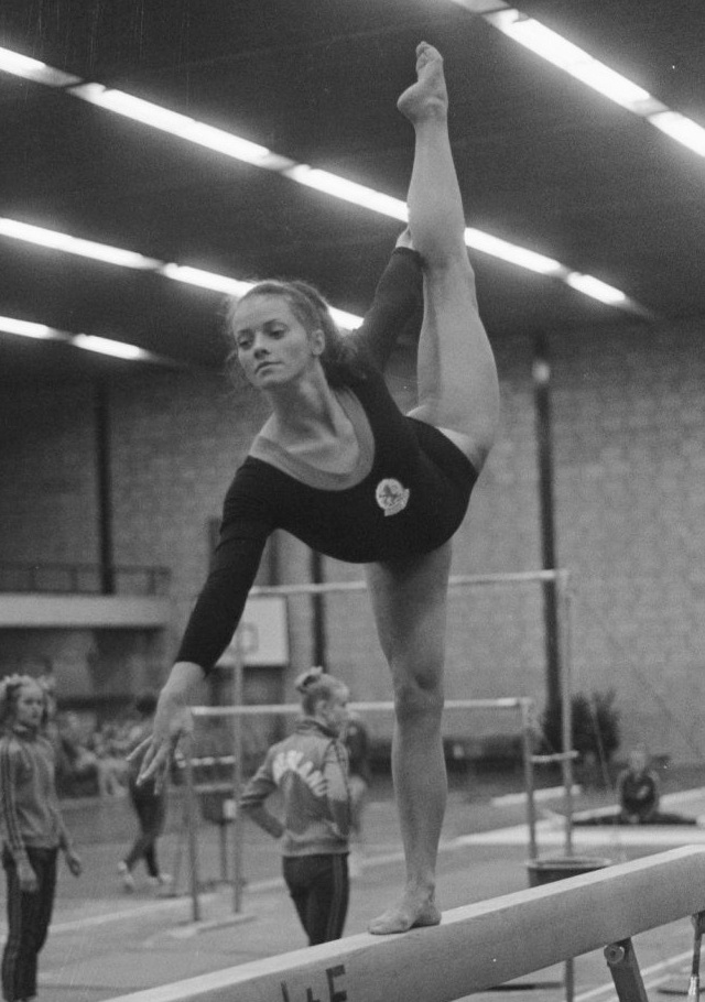 Ans van Gerwen